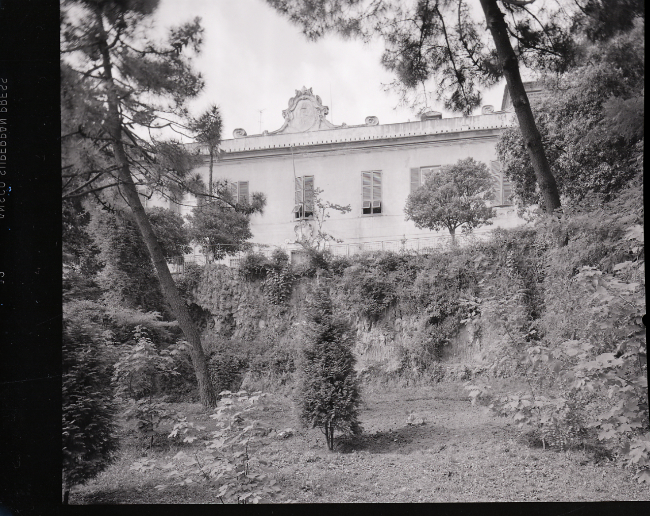 Servizio fotografico : Genova, 1964 / Paolo Monti. - Buste: 5, Fototipi: 5 : Negativo b/n, gelatina bromuro d'argento/ pellicola ; 10x12. - ((Serie costituita da 5 buste sciolte di negativi identificati con i nn.: 8173, 8174, 8175, 8176, 8177. - Il negativo identificato con il numero 46397 è stato realizzato per Zodiac. - Occasione: Documentazione per la pubblicazione: Italia Nostra (a cura di), "Le ville genovesi", catalogo della mostra, Genova 1962, Genova, Comune di Genova, 1967. - Fonte: Monografia di Italia Nostra (a cura di): Le ville genovesi, catalogo della mostra, Genova 1962, Genova, Comune di Genova (1967). - Fonte: Lettera di Paolo Monti: I. Carteggi/ Genova - Enrico (1963-1966), presso Archivio Paolo Monti. Camicia con documenti dattiloscritti e manoscritti vari relativi al lavoro eseguito per Italia Nostra: preventivi, lettere, inventari. - Fonte: Agenda di Paolo Monti: R 1 - Monti/ 1 aprile 1963 - 6 giugno 1964/ 6000-8193 (1963-1964), presso Archivio Paolo Monti